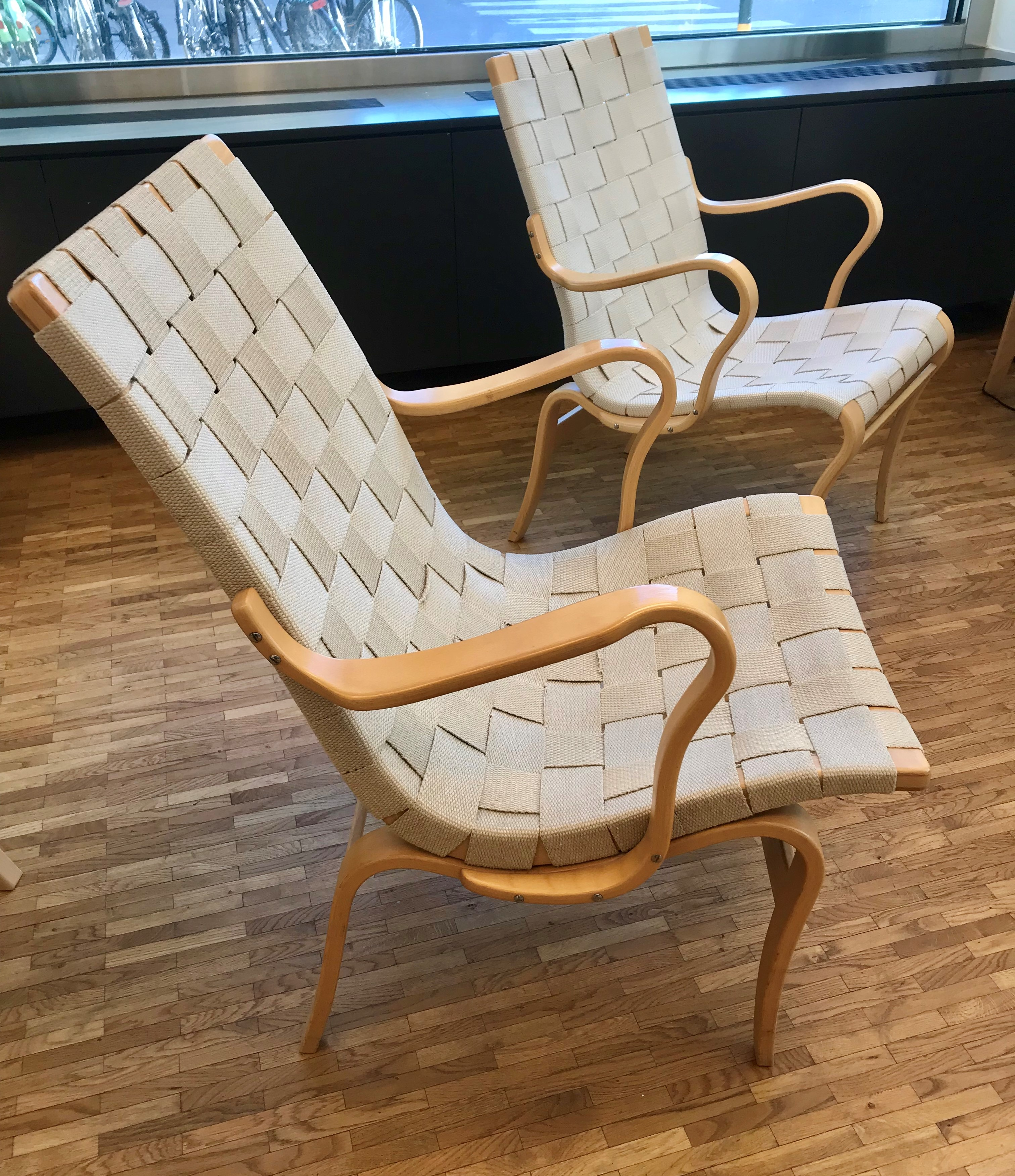 Den främre stolen heter Eva och den bakre Mina, båda är formgivna av Bruno Mathsson.